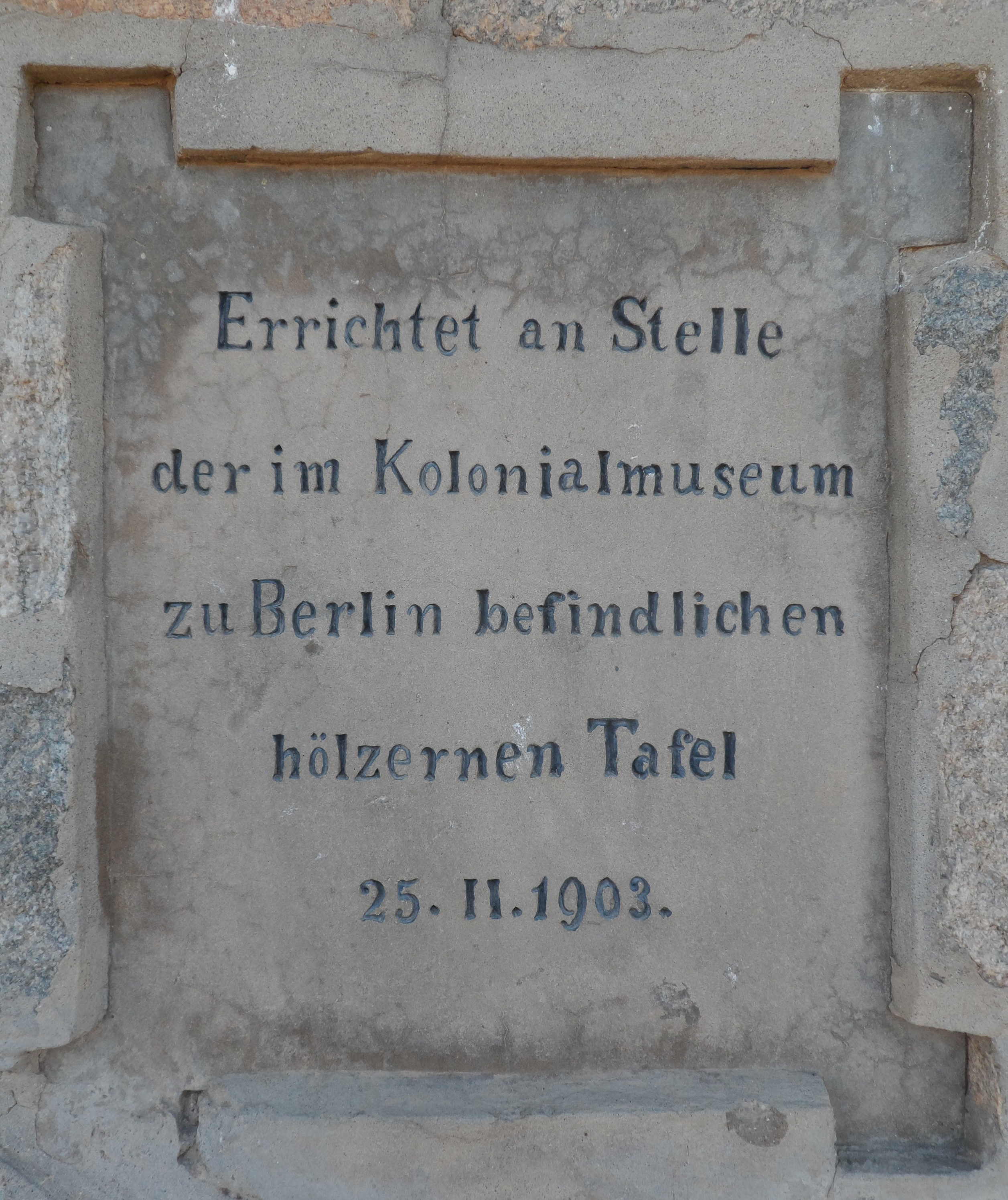 Lüderitz-Territorium-Denkmal in Lüderitz, Namibia, am nördlichen Ende der Industrie Straße, östlich von der Lüderitz Bay Cannery. Das früher auf dem Nautilus-Friedhof befindliche Denkmal (Lüderitz memorial) wurde am 15.3.1969 zum Nationaldenkmal erklärt. Da der Friedhof im Jahr 1977 aufgegeben wurde, wurde dieses Denkmal an die heutige Stelle vverlagert und zusammen mit 5m umgebenden Landes am 10.6.1980 erneut zum Nationaldenkmal erklärt.